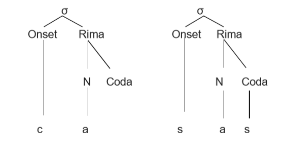 Aplicação da estrutura não linear da sílaba